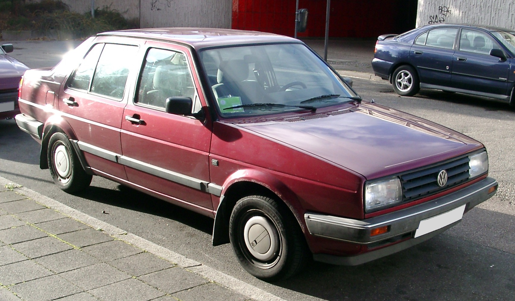 VW Jetta